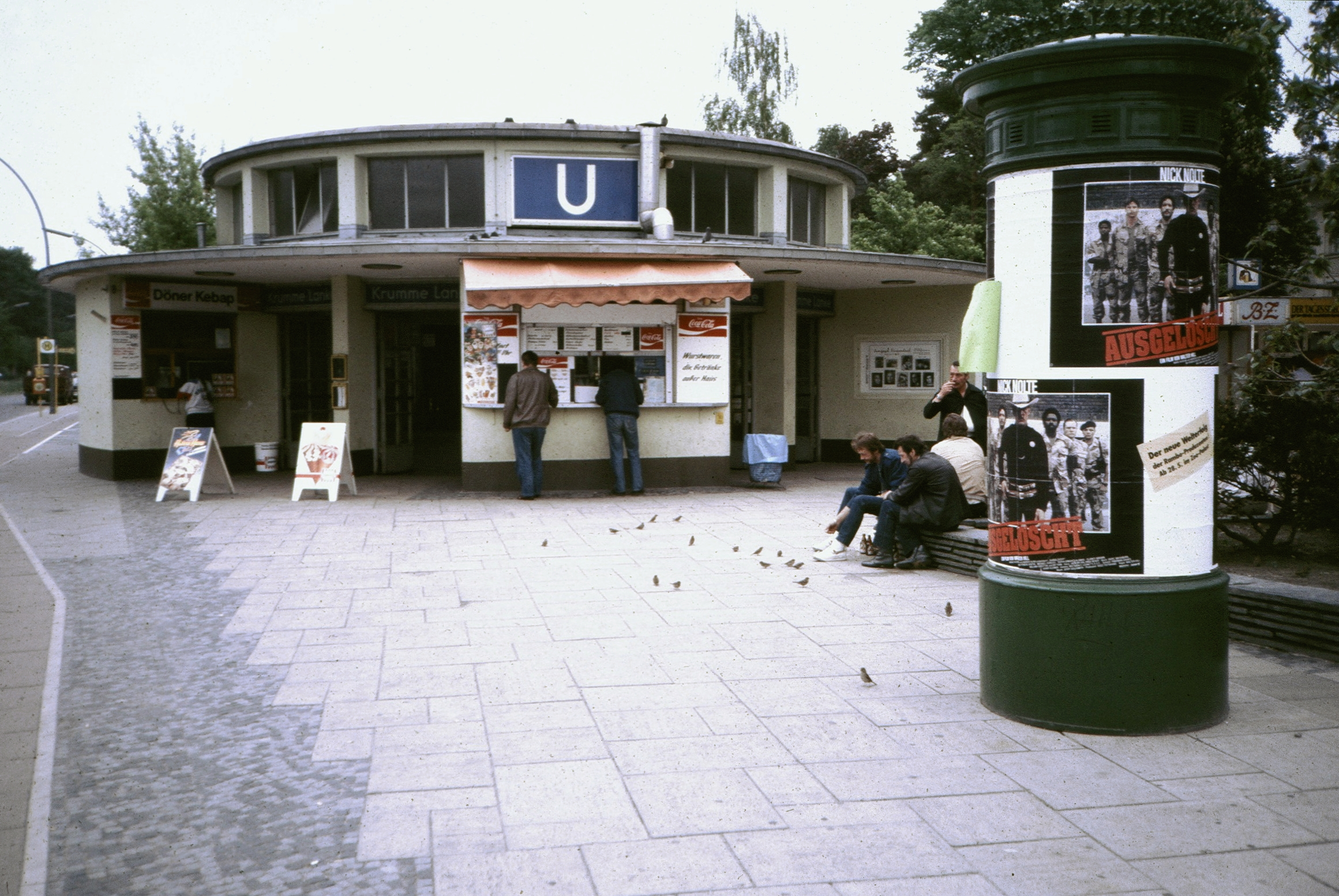 U-Bahnhof Krumme Lanke (Berlin)